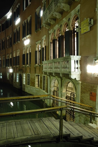 Fondazione Querini Stampalia - facciata esterna